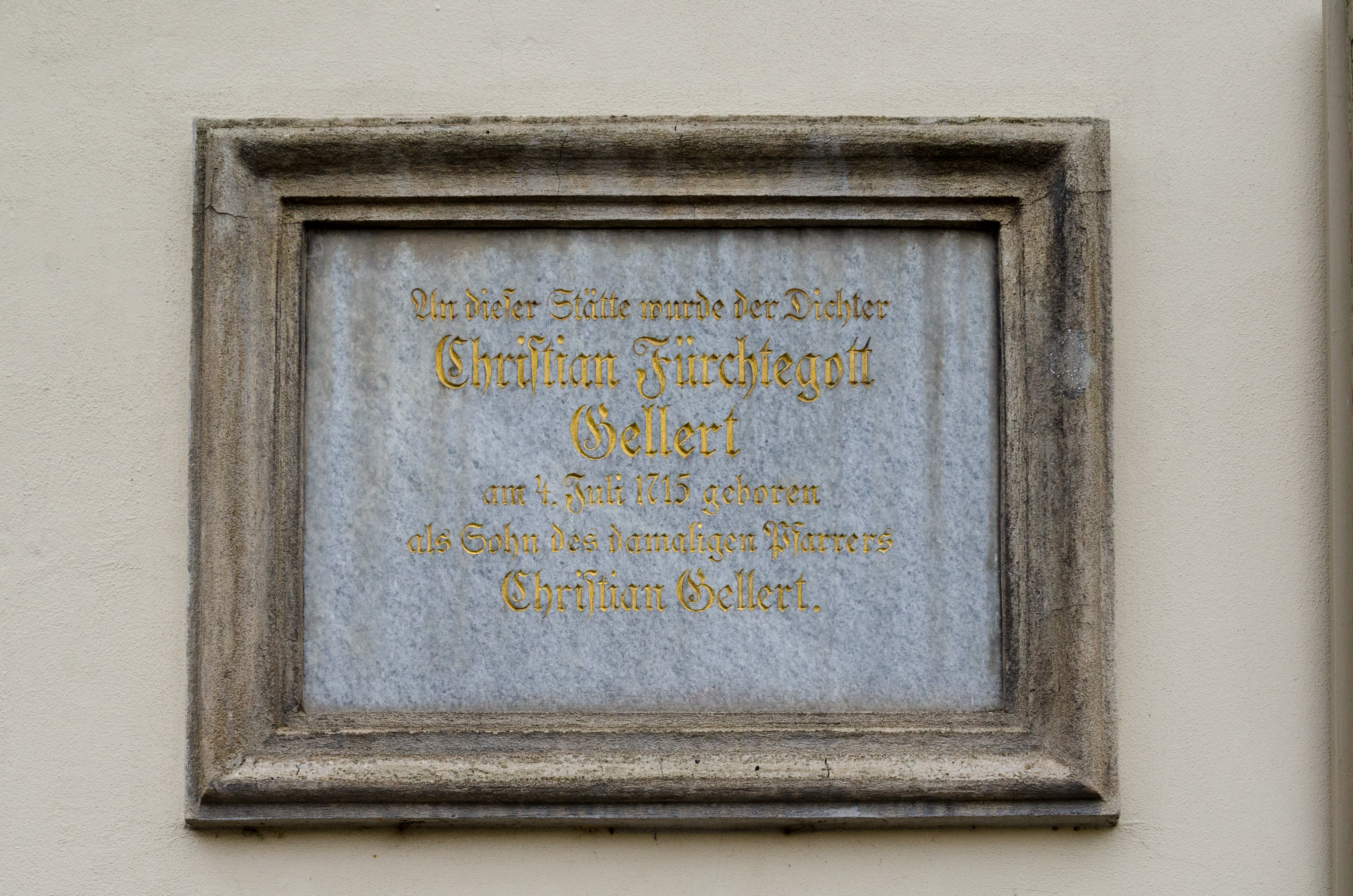 Hainichen, Gellertplatz 5, Pfarrhaus, Gedenktafel am Geburtshaus Christian Fürchtegott Gellerts